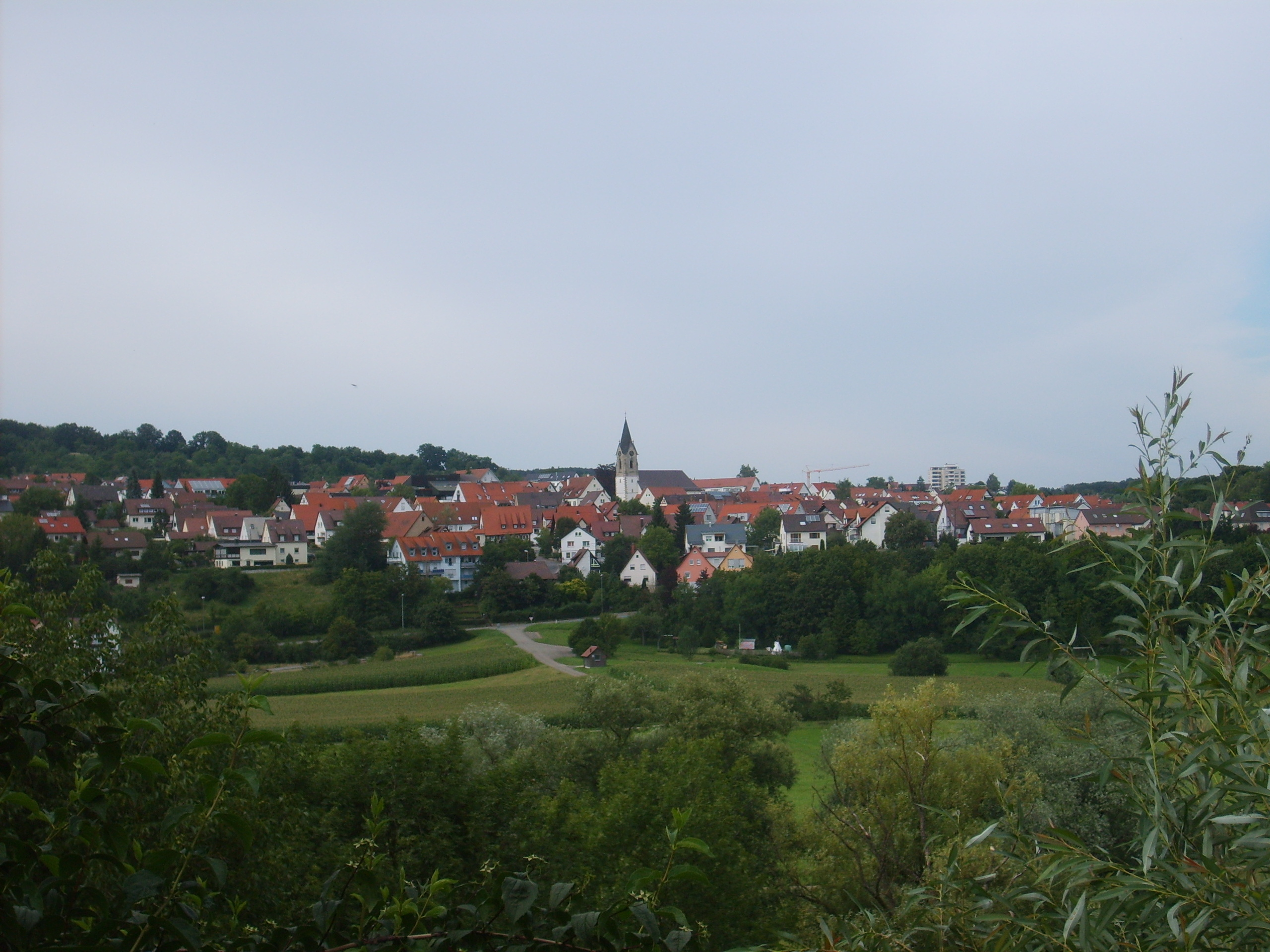 Die Ortslage von Pliezhausen aus Richtung Oferdingen gesehen.